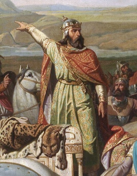 Détail issu de la peinture "El rey Don Rodrigo arengando a sus tropas en la batalla de Guadalete" par Bernardo Blanco y Pérez (Musée du Prado).